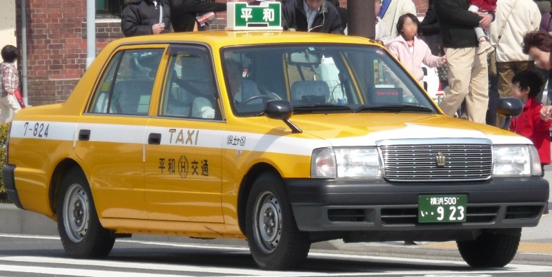 Heiwakotsu taxi.